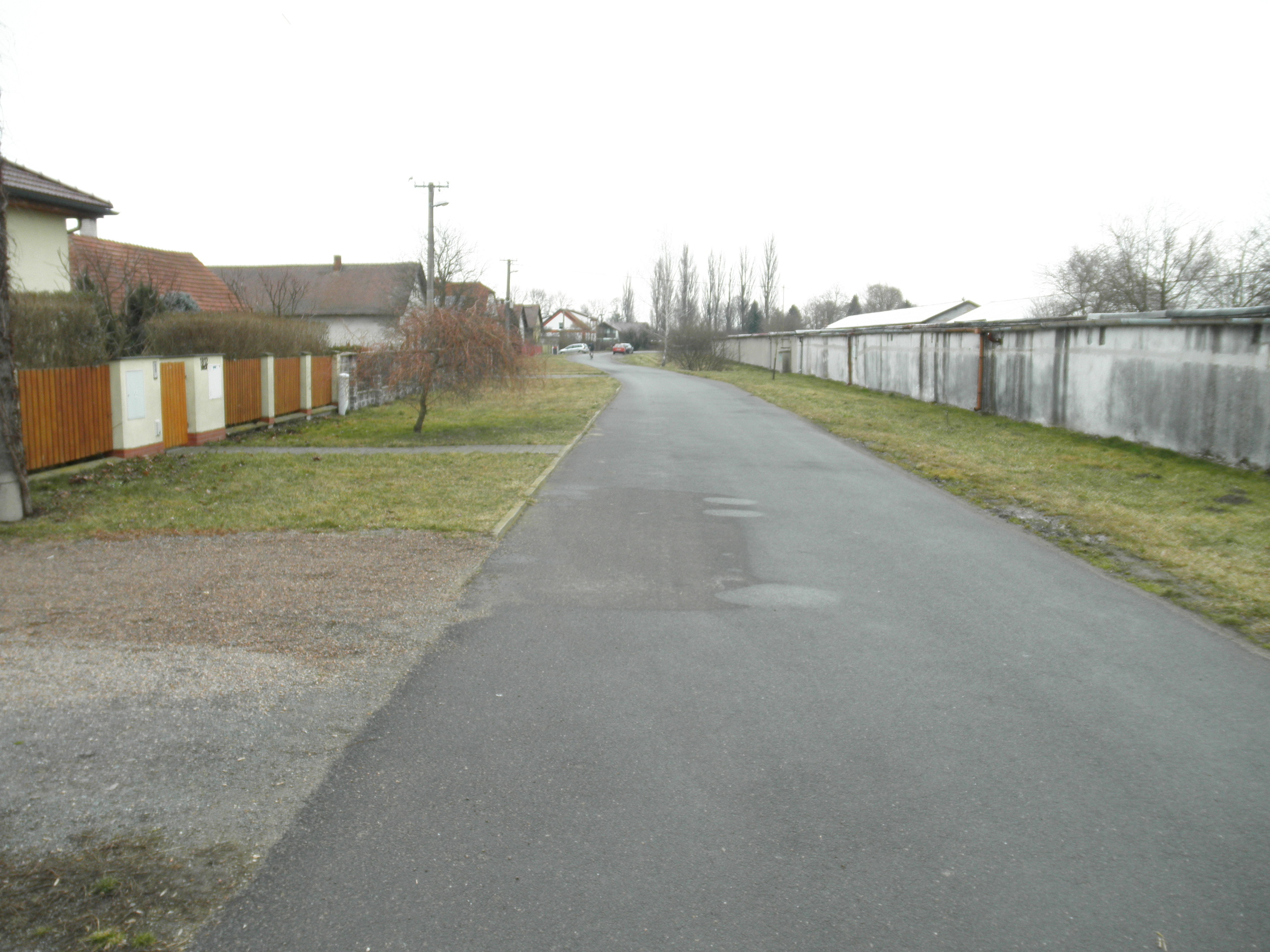 Hurka u Pardubic